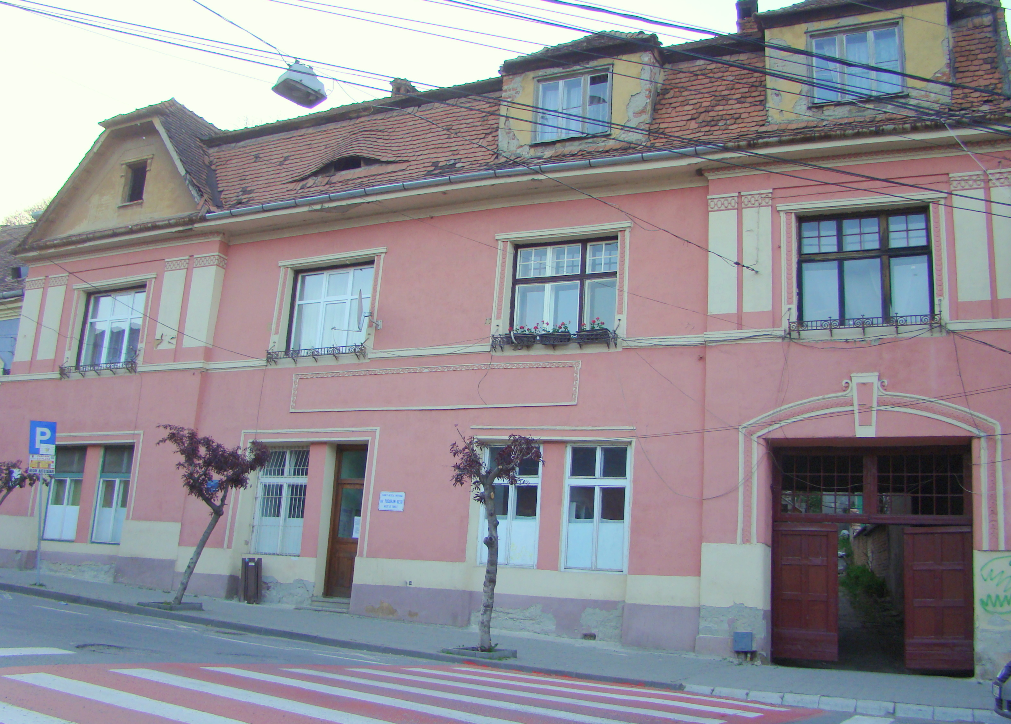 Casă, municipiul Sighișoara, str. Chendi Ilarie 10 1800